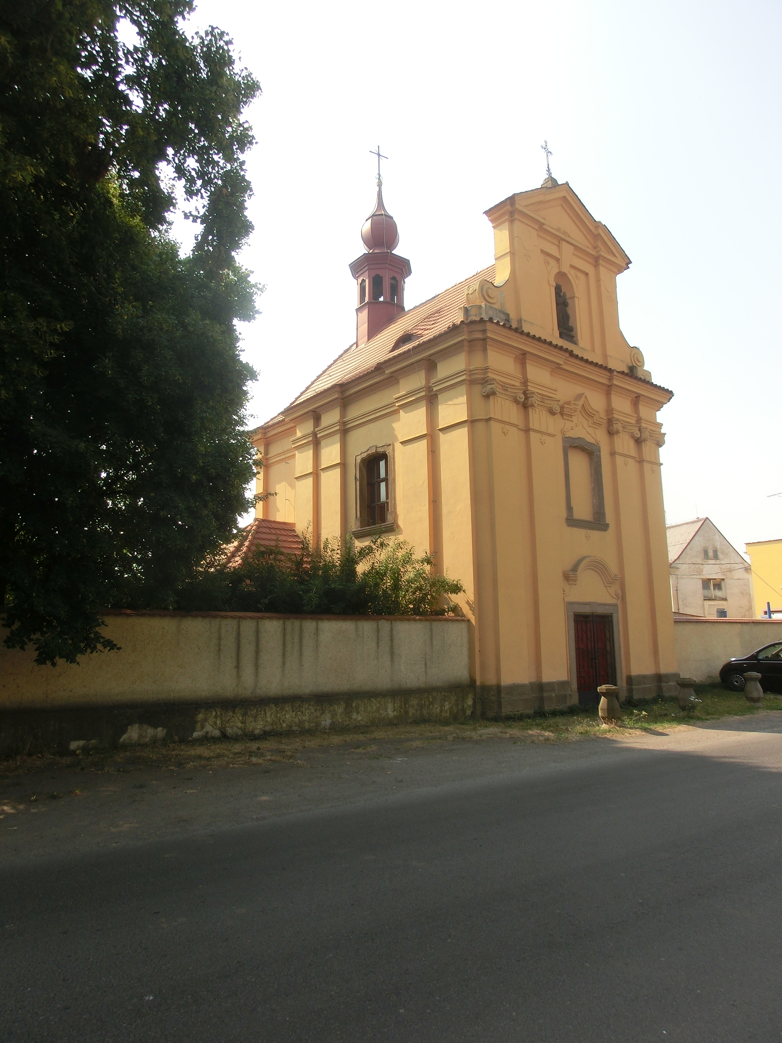 Kaple sv. Františka v Prosmykách